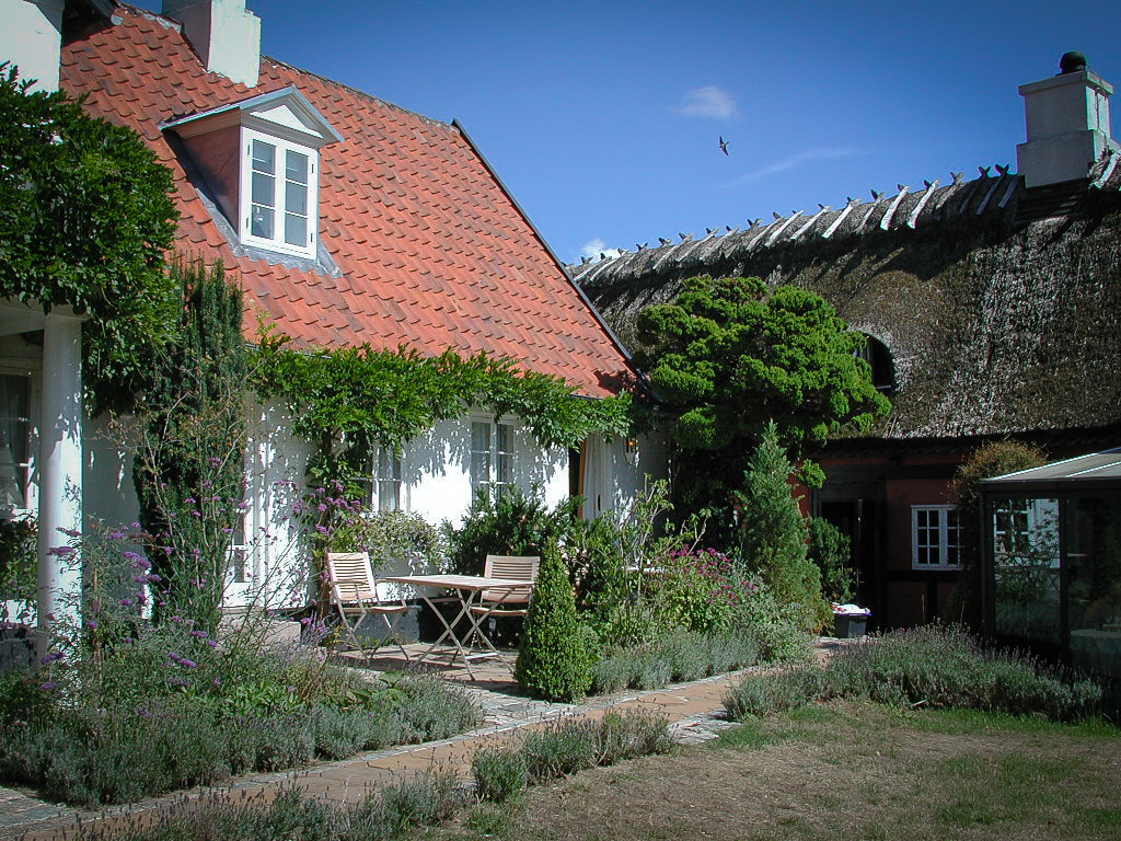 Falsled Kro, Fyn, Denmark